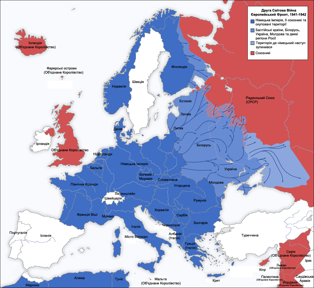 Мапа Європи під час Другої Світової Війни